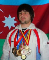 Ролан Гулиев